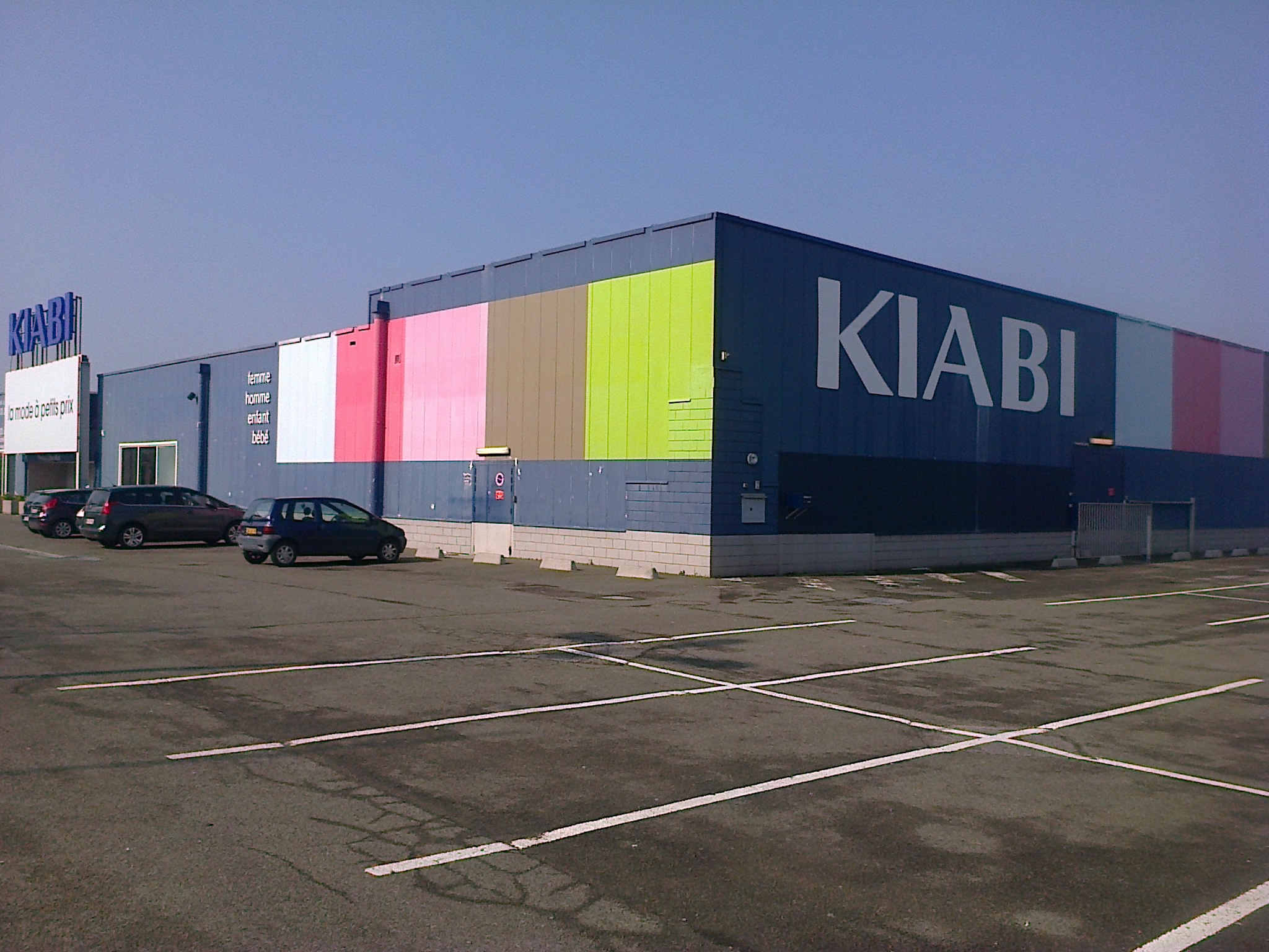 Magasin Kiabi de Plaisir (Yvelines, France).